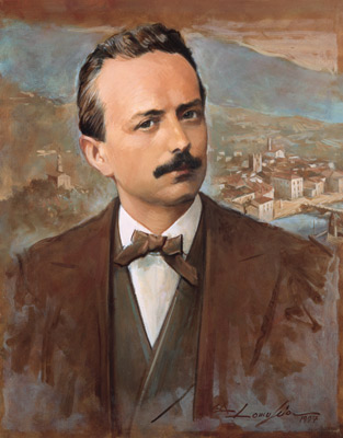 Tela di Beatificazione del Beato Giuseppe Antonio Tovini, dipinto di Giuseppe Antonio Lomuscio.